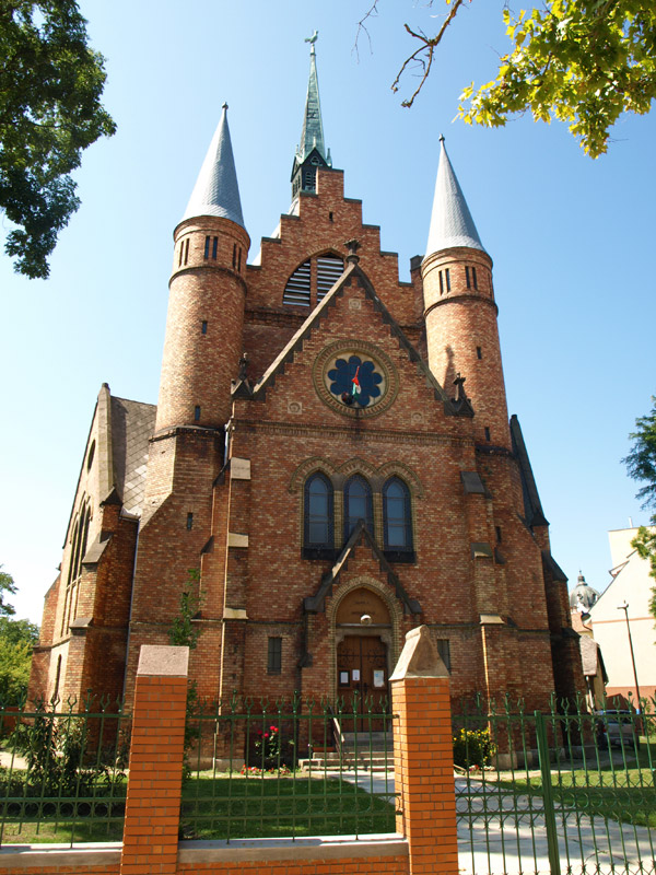 Szolnoki református templom